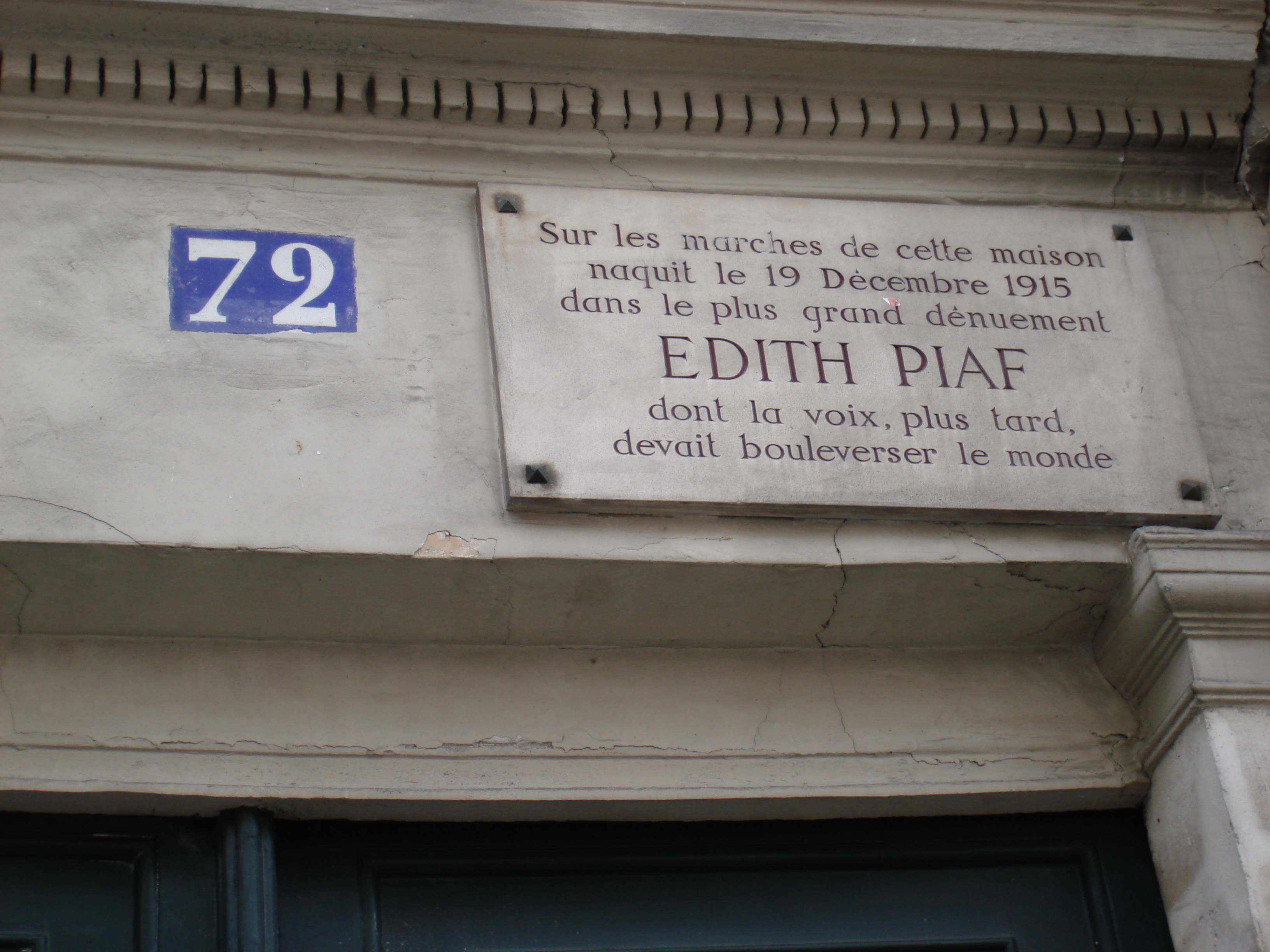 Plaque commémorant la naissance d'Edith Piaf au 72 de la rue de Belleville, dans le 20ème arrondissement de Paris